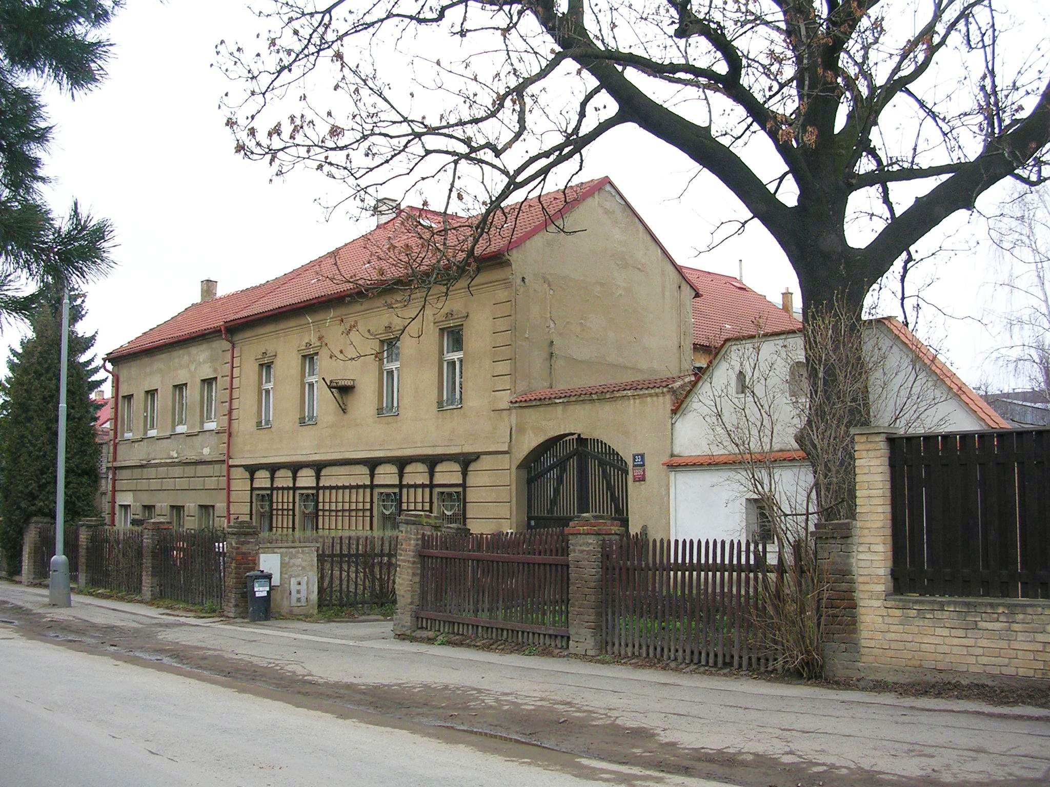 Praha, Strašnice: zbytky původní vesnice Nové Strašnice. Novostrašnická č. o. 31 a 33.